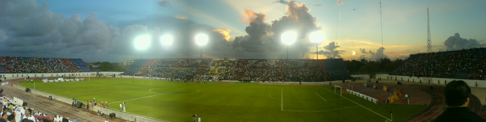 Estadio olímpico Andrés Quintana Roo